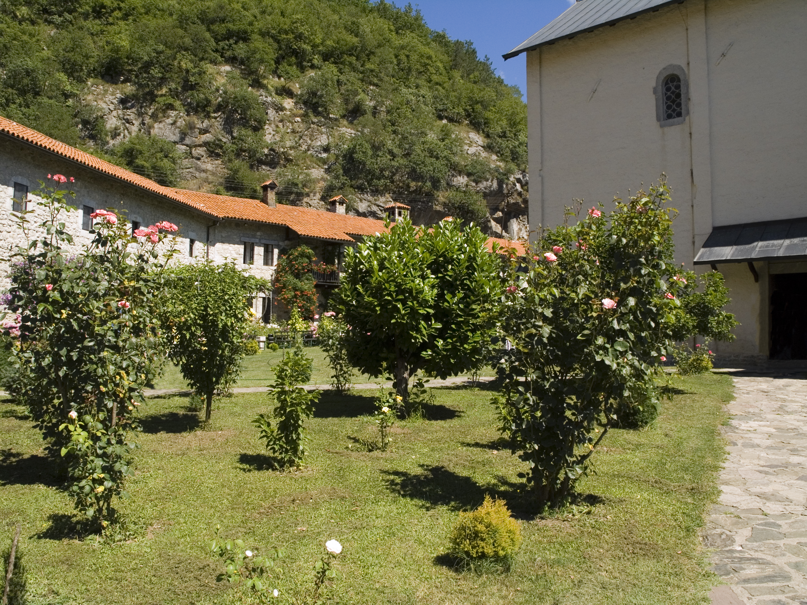 Черногория. Монастырь Морача. Внутренний двор монастыря